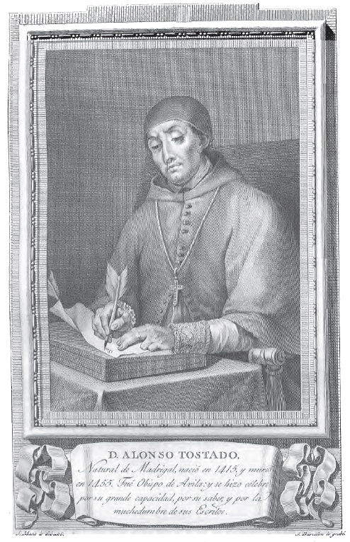 Retrato del prelado espáñol Alonso Fernández de Madrigal (1410-1455), Obispo de Ávila y conocido como el Tostado.